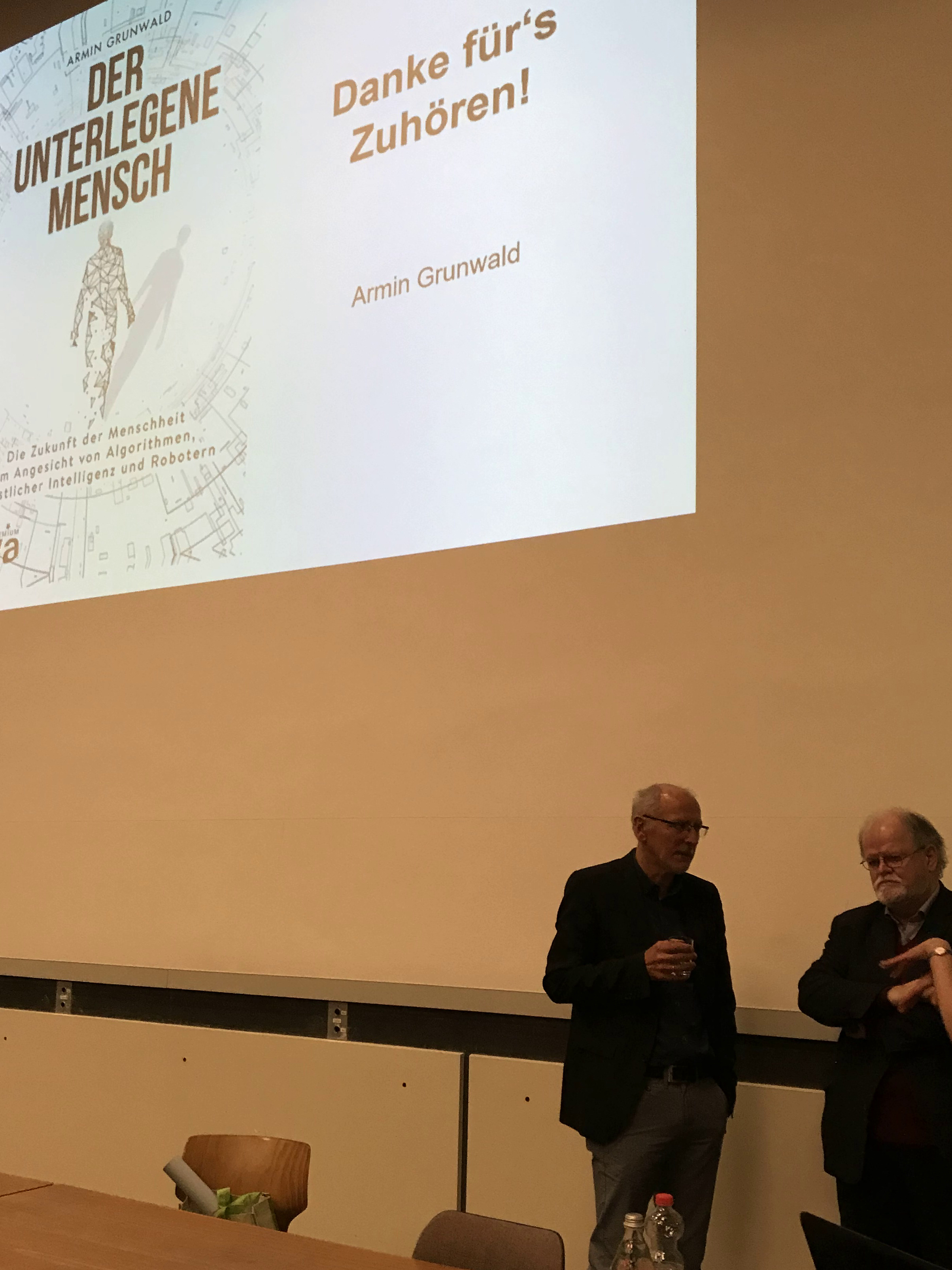 Diskussion nach einem Vortrag von Armin Grunwald in der Universität Freiburg zum Thema Machen wir uns mit der Digitalisierung selbst überflüssig? Neben Grunwald steht Germanist Werner Frick.